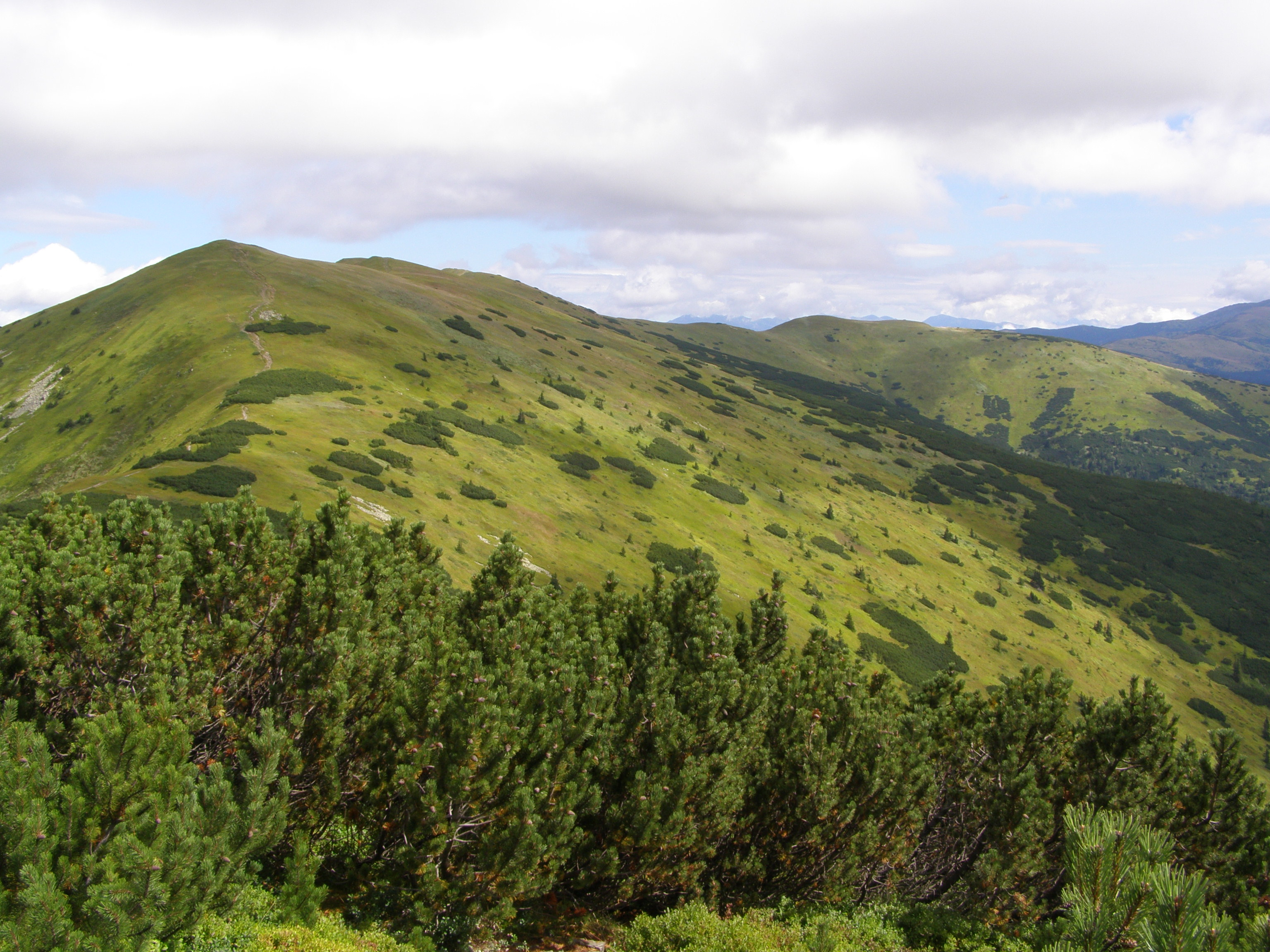 Nízké Tatry, Ďumbierské Tatry, pohled z vrcholu Prašivá (1652 m) na severovýchod, zleva: Malá Chochuľa (1720 m), Veľká Chochuľa (1753 m) a Košarisko (1695 m)